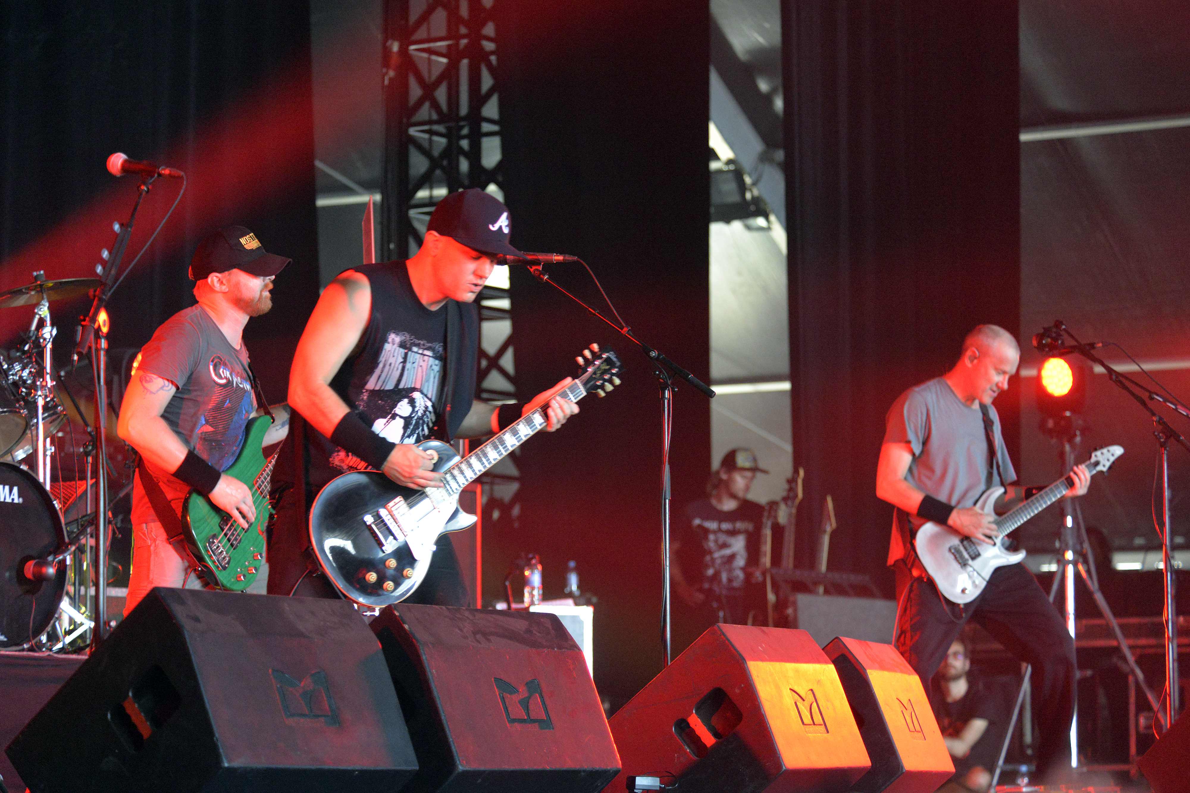 Concert du groupe américain Helmet au Hellfest 2017.